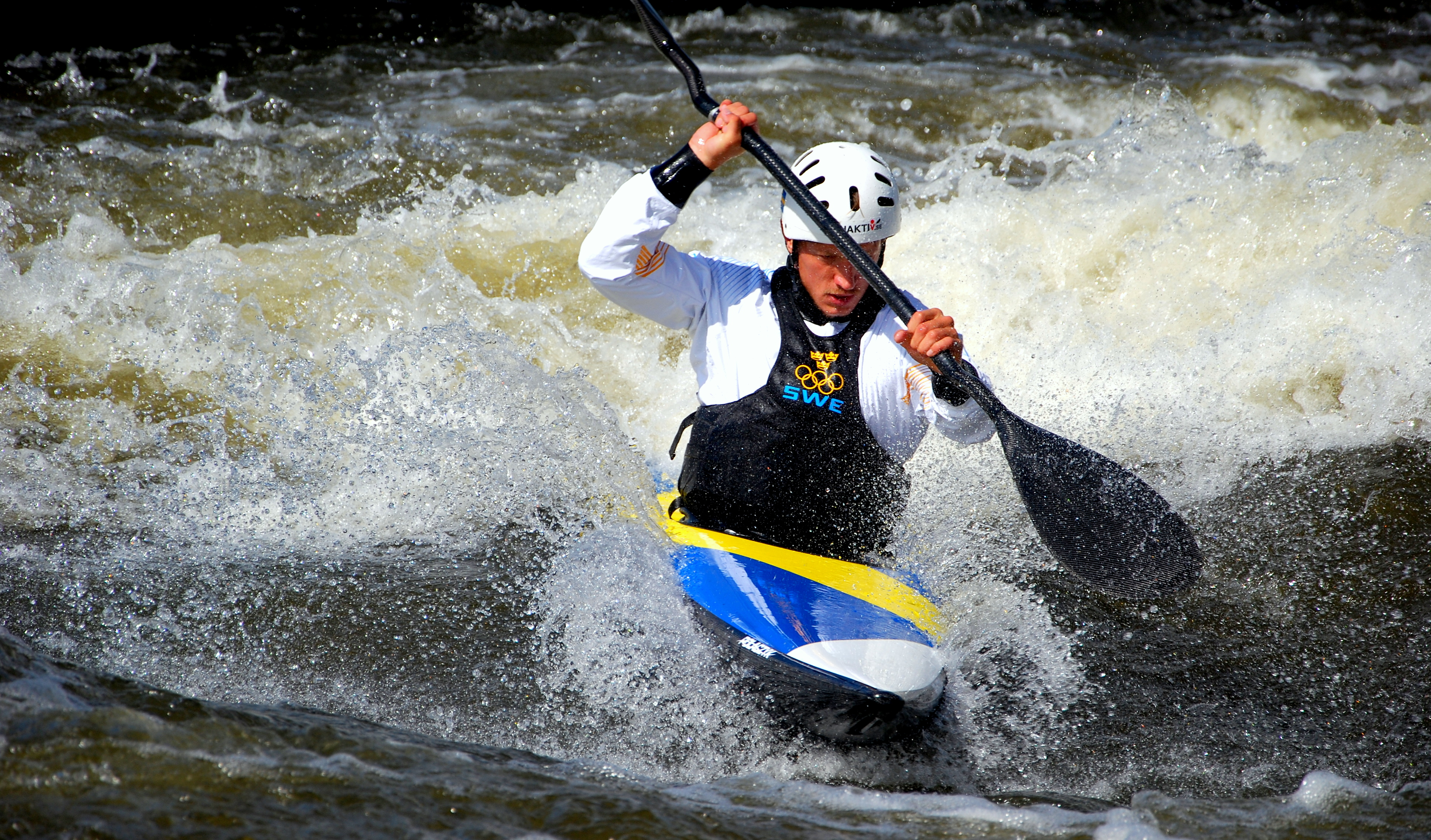 Isak Öhrström blir historisk när han paddlar OS 2016 som första svensk någonsin.